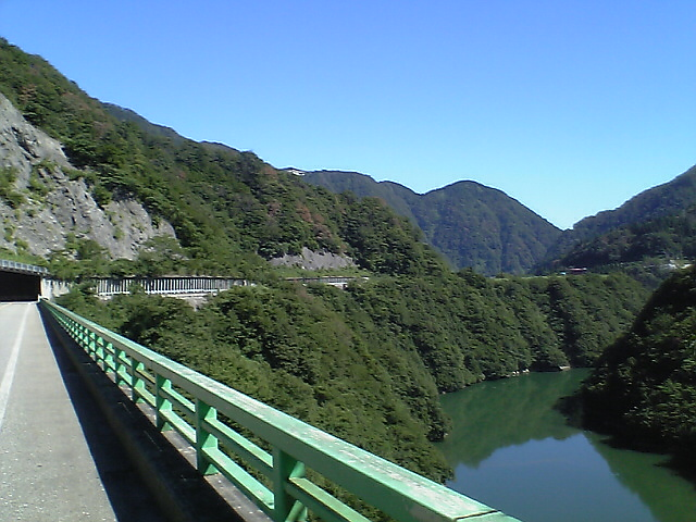 国道156号